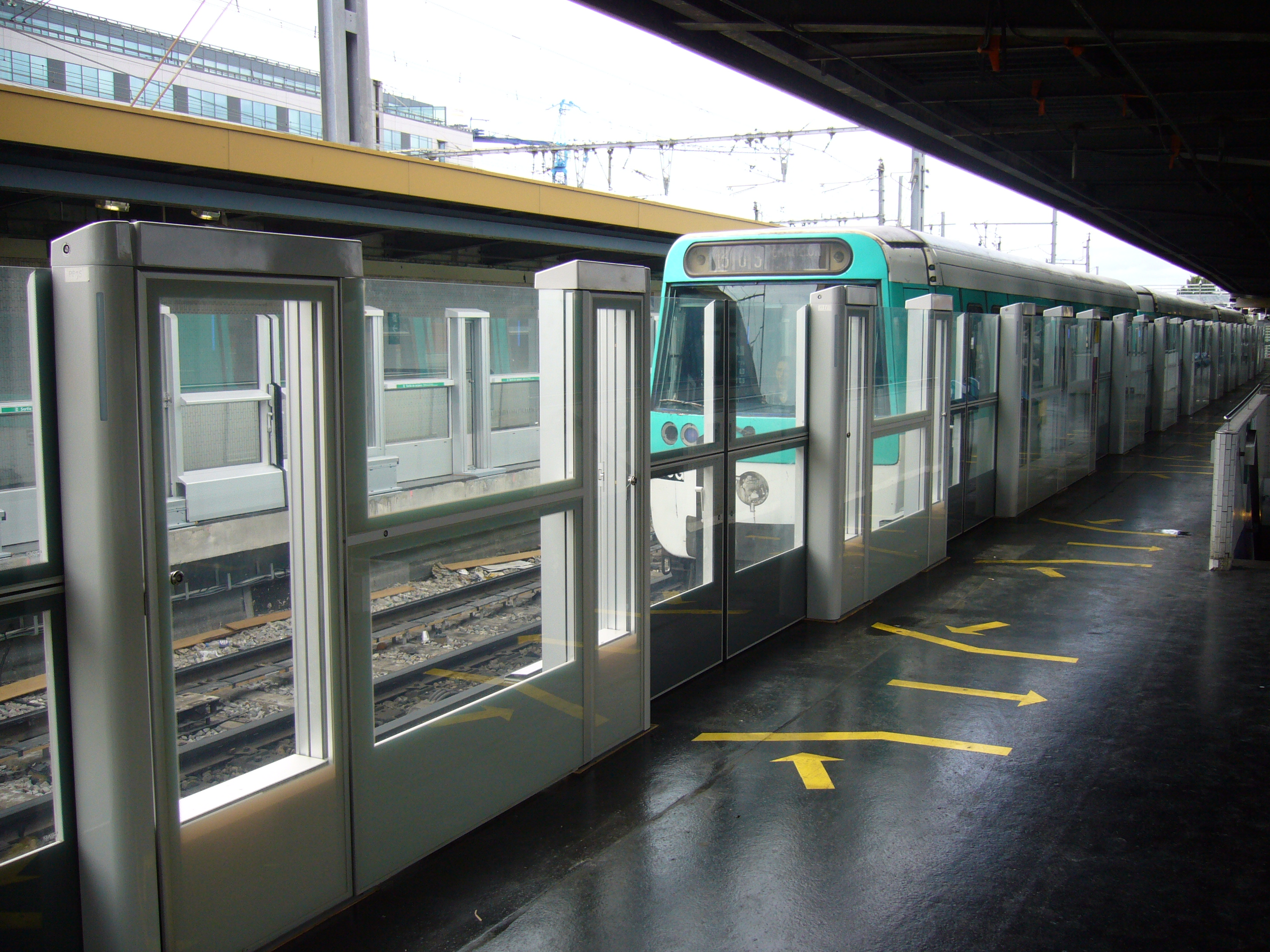 Portes palières protégeant les voies de la station Châtillon Montrouge sur la ligne 13 du Métro de Paris